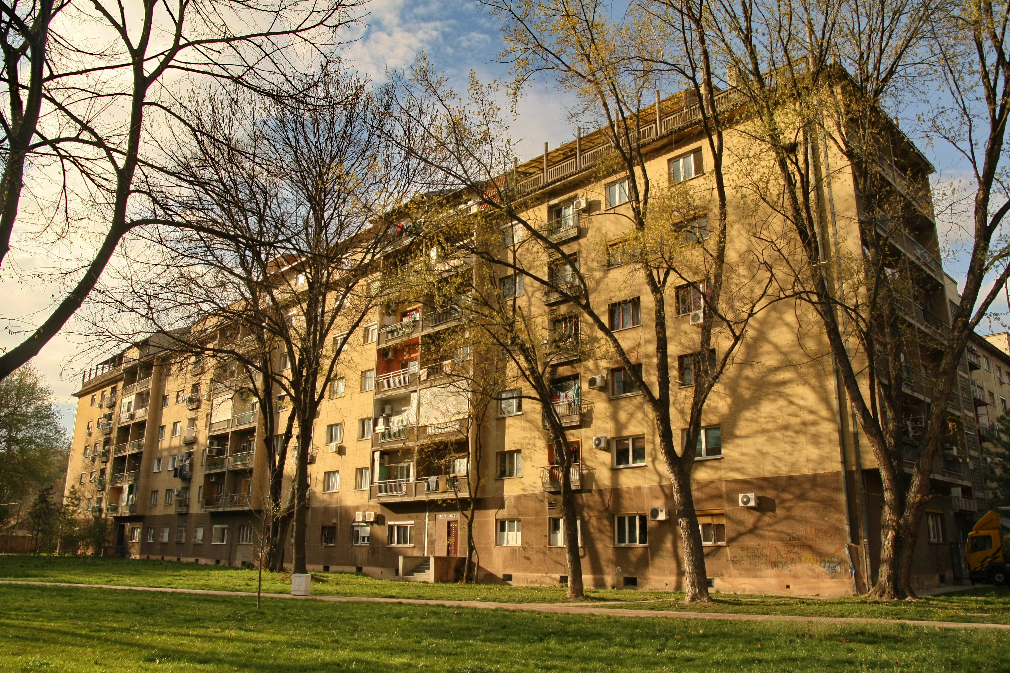 jedan od paviljona u ulici Sremskih odreda